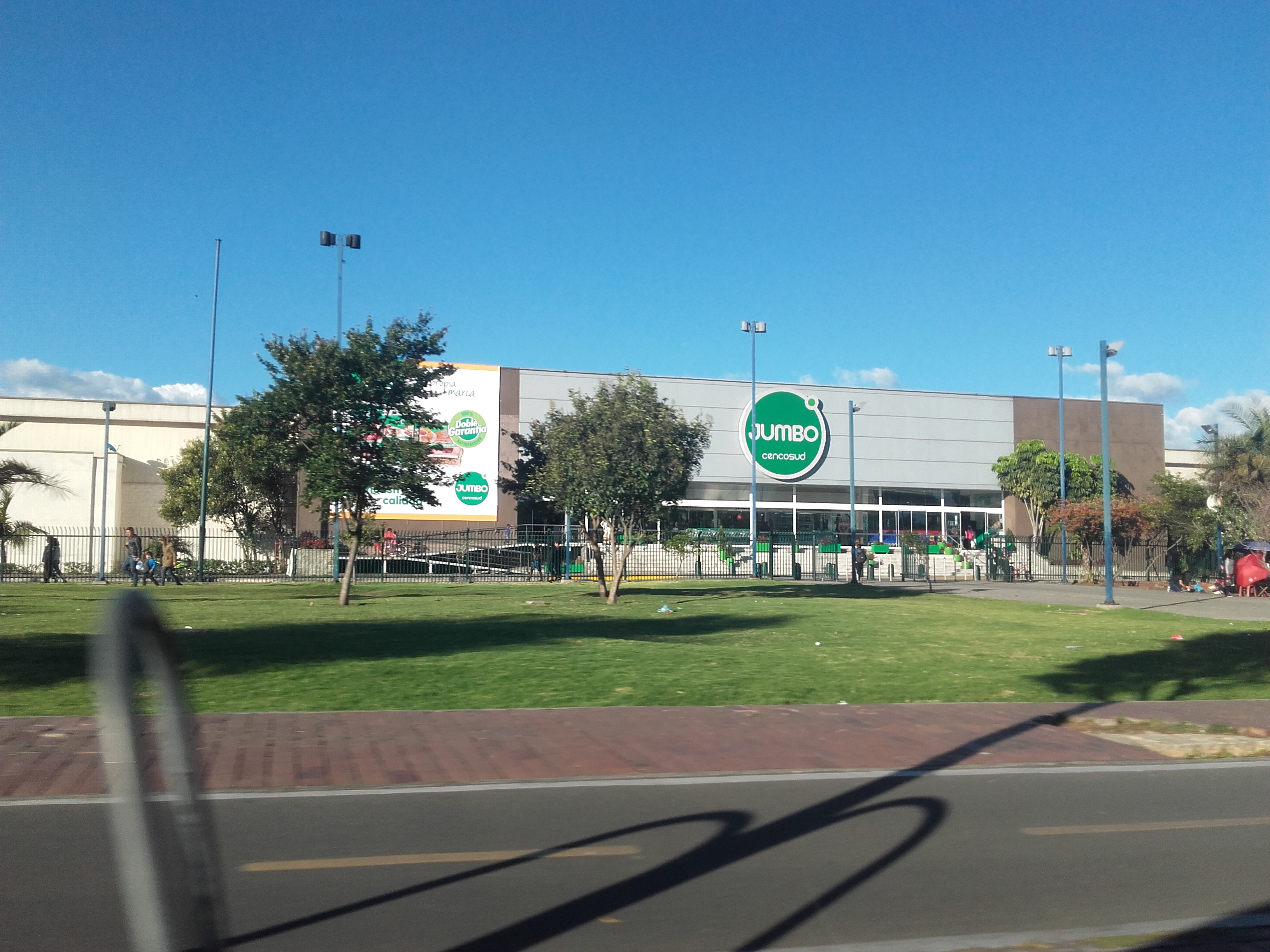 fjfjfjfjfn